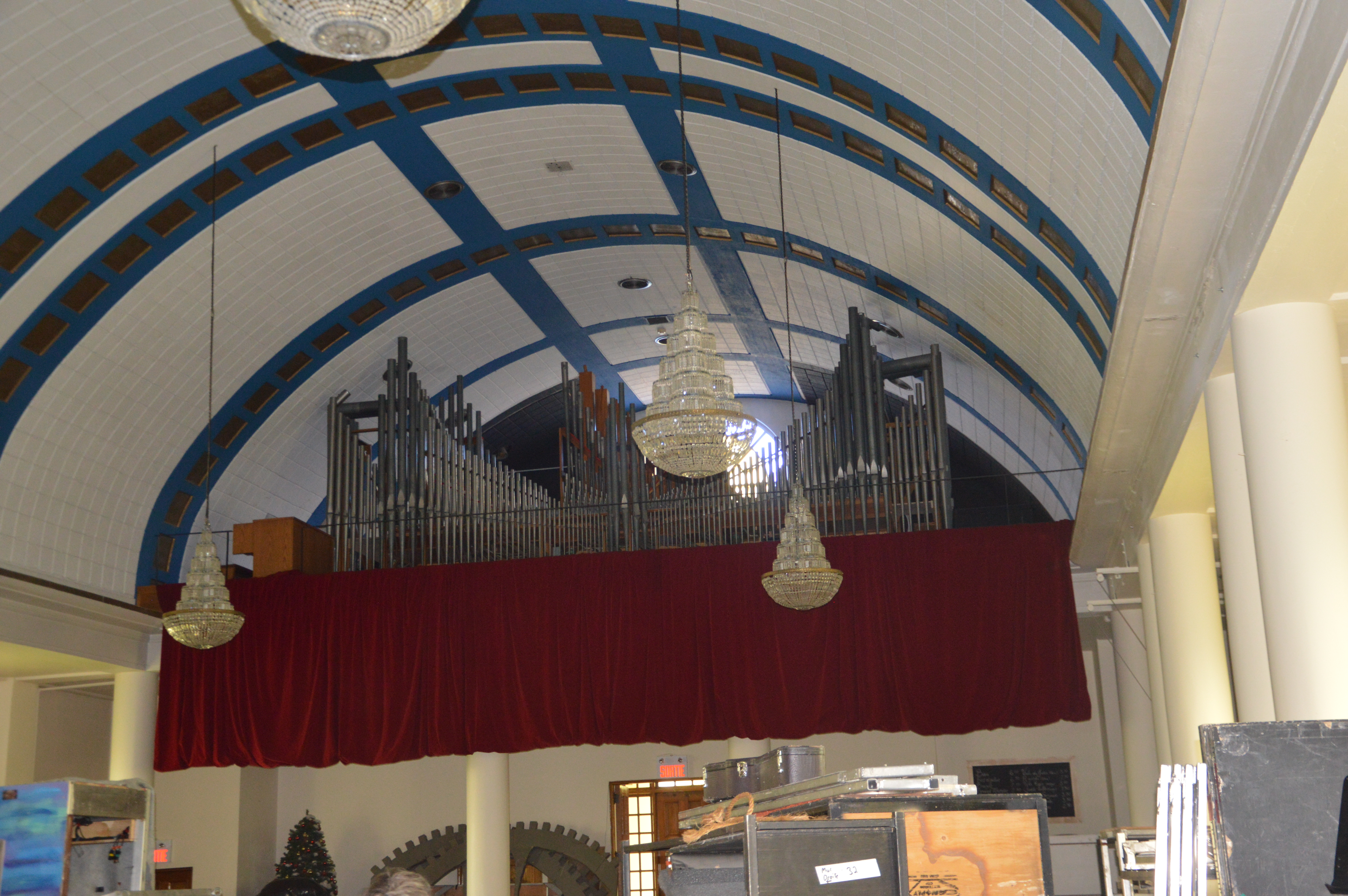 Église de saint Jacques et ancien presbytère, Arvida, Jonquière, Québec, Canada (intérieur).